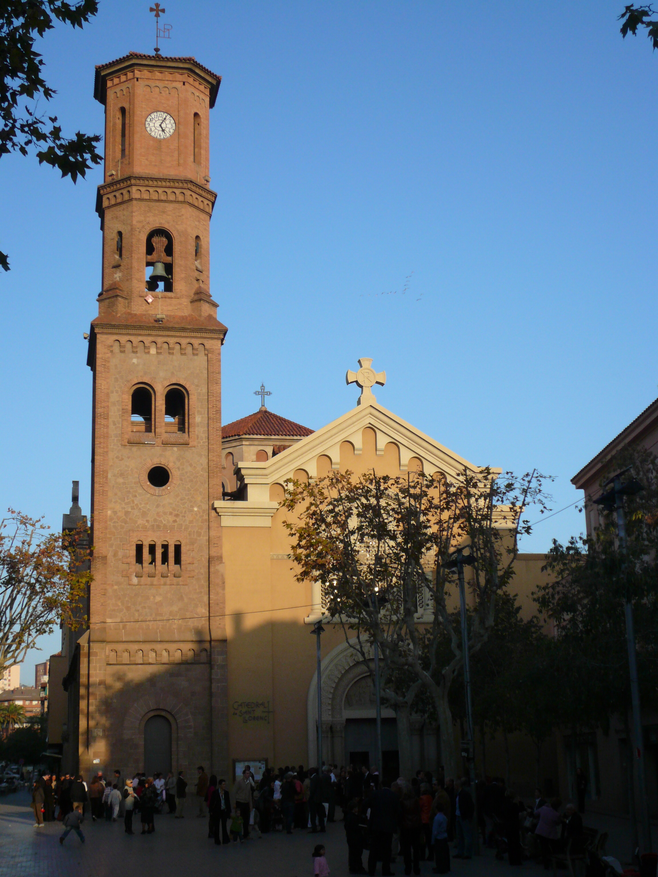 Parròquia de Sant Llorenç, ara catedral de Sant Feliu de Llobregat. Object location41° 22′ 50.87″ N, 2° 02′ 45.7″ E Sant Feliu de Llobregat Cathedral Native nameCatedral de Sant Feliu de LlobregatLocationSant Feliu de Llobregat, provincia de Barcelona, (Spain)Coordinates41° 22′ 51.2″ N, 2° 02′ 46.78″ E Established2004Authority control : Q2942382 Catalunya: 19207 institution QS:P195,Q2942382